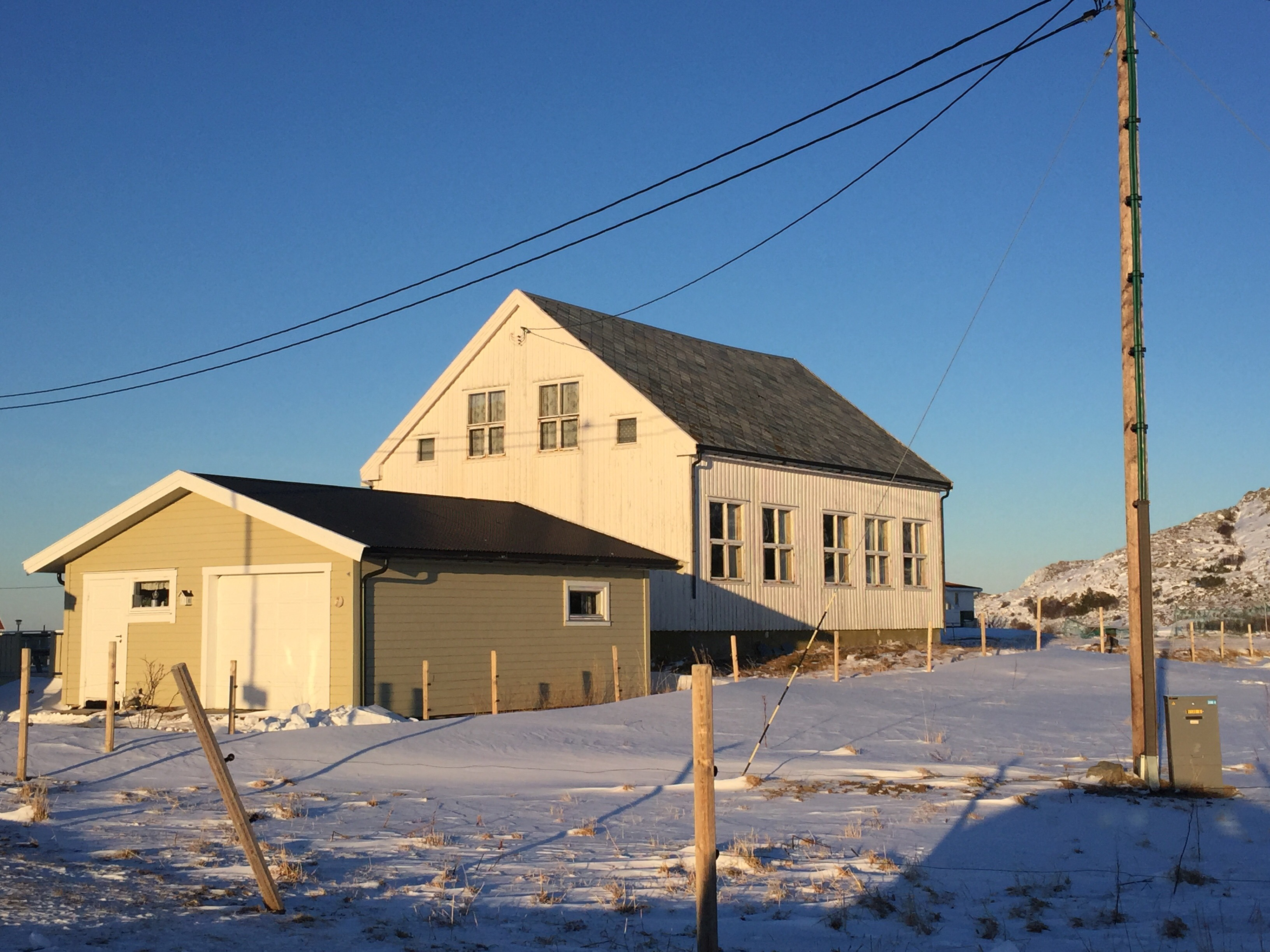 Valøy kapell (kirke) på Ytre Vikna i Vikna kommune i Trøndelag. Ombygget fra skolestue til kirkebygg i 1972.